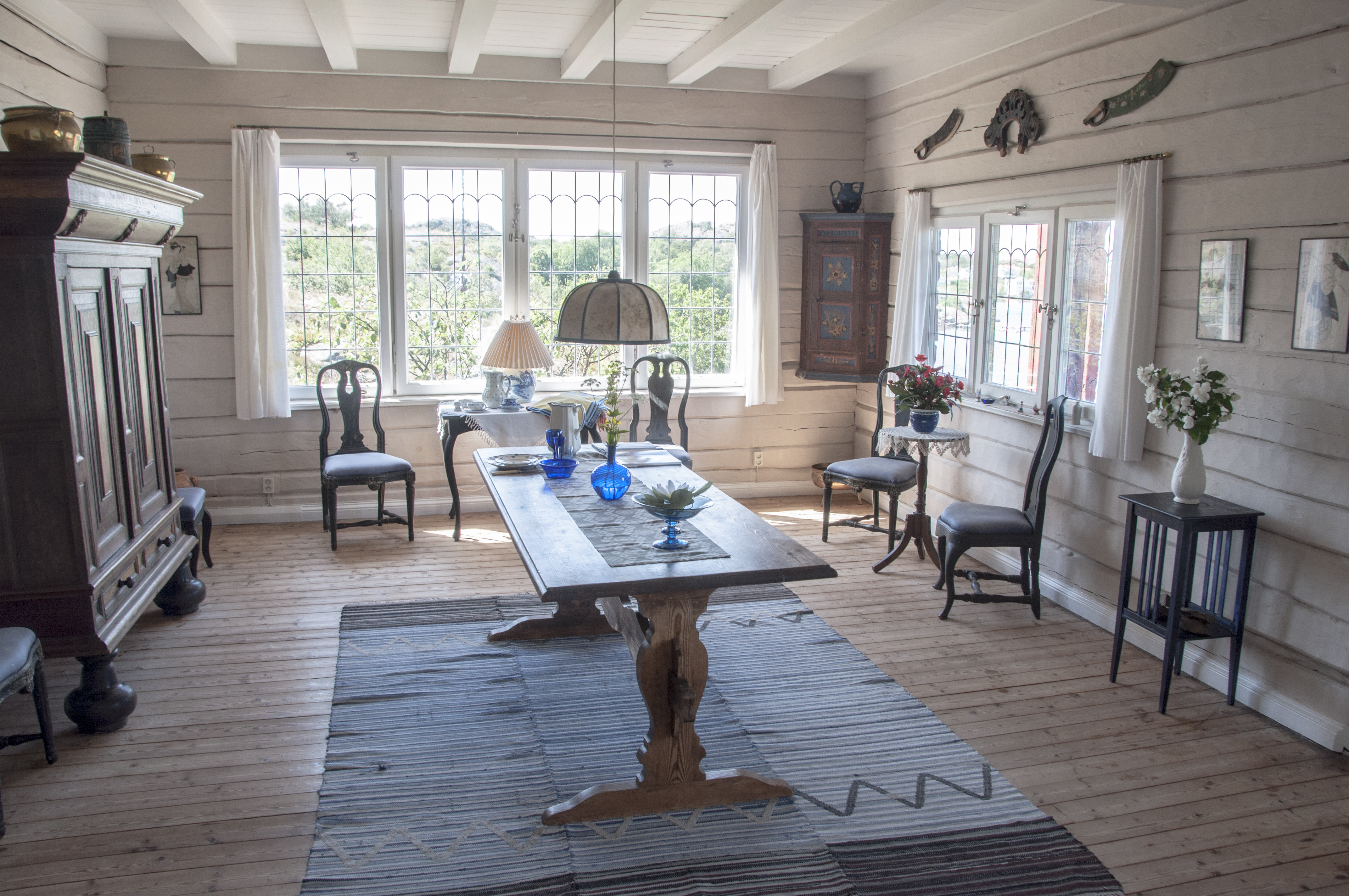 Carl Wilhelsons villa, interiör